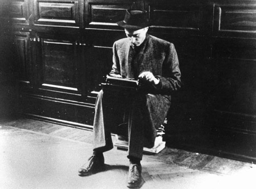 Montanelli nella sede del Corriere della Sera o appena tornato dalla Finlandia nel 1940 o al ritorno da Budapest nel 1970.